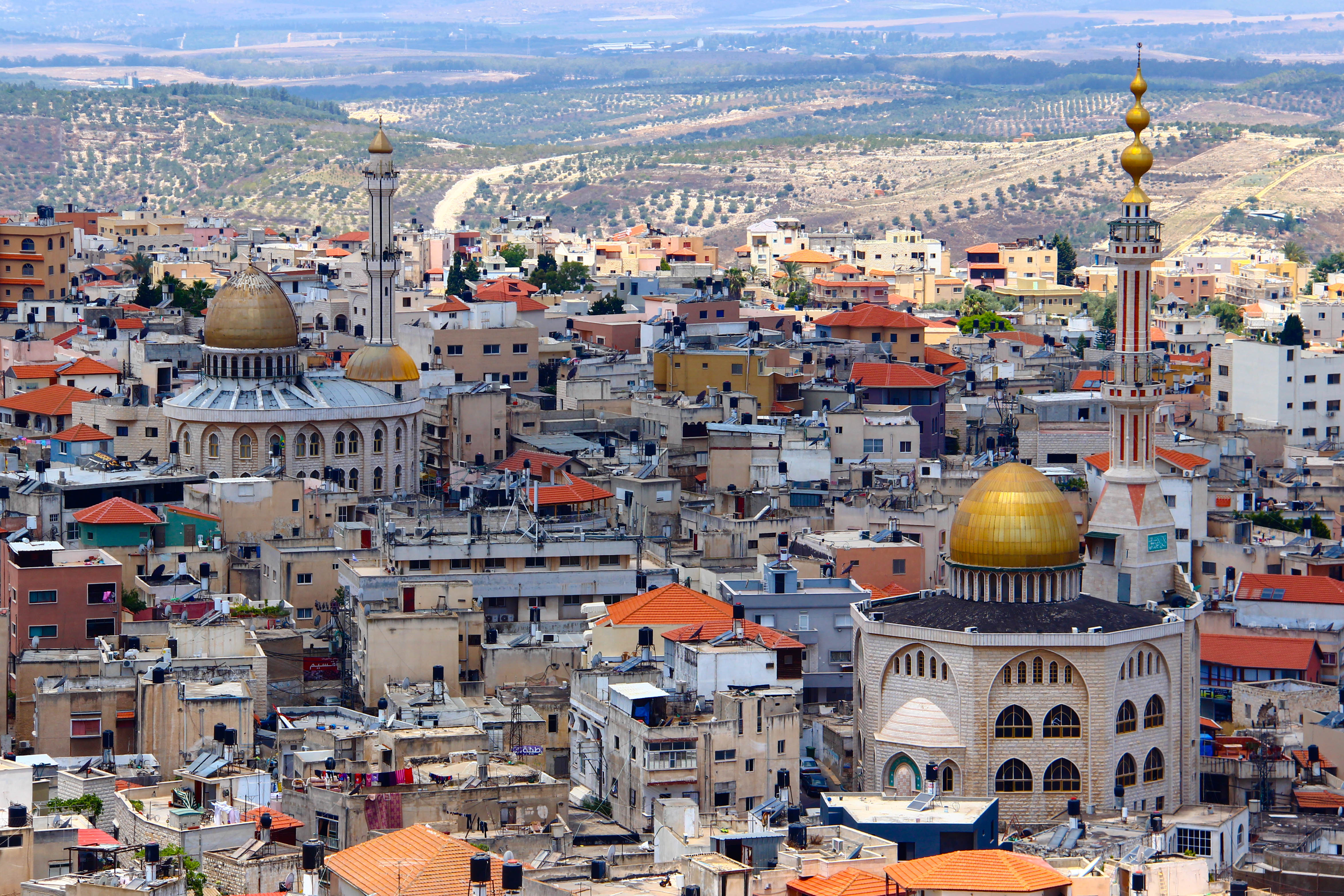 أم الفحم